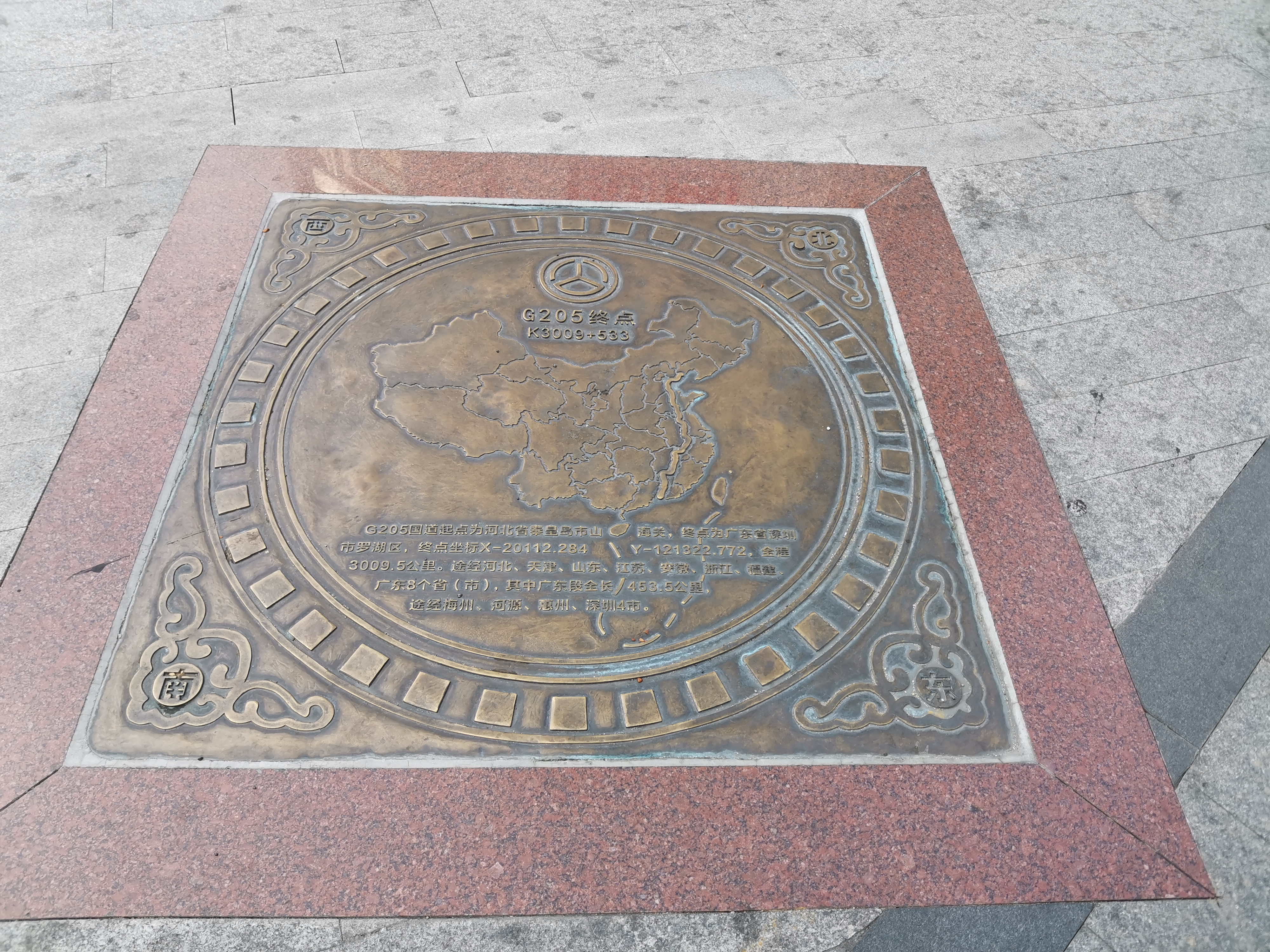 位于深圳罗湖区东门的205国道终点纪念标